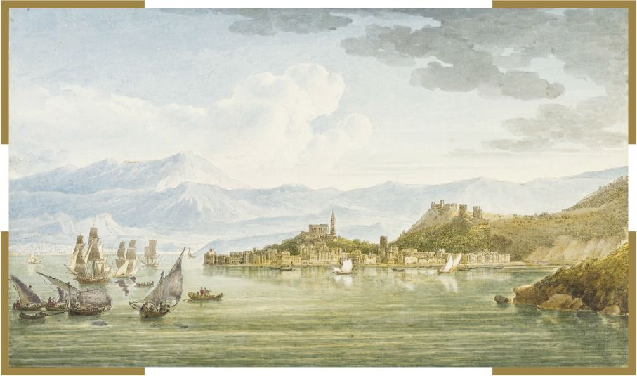 Piran